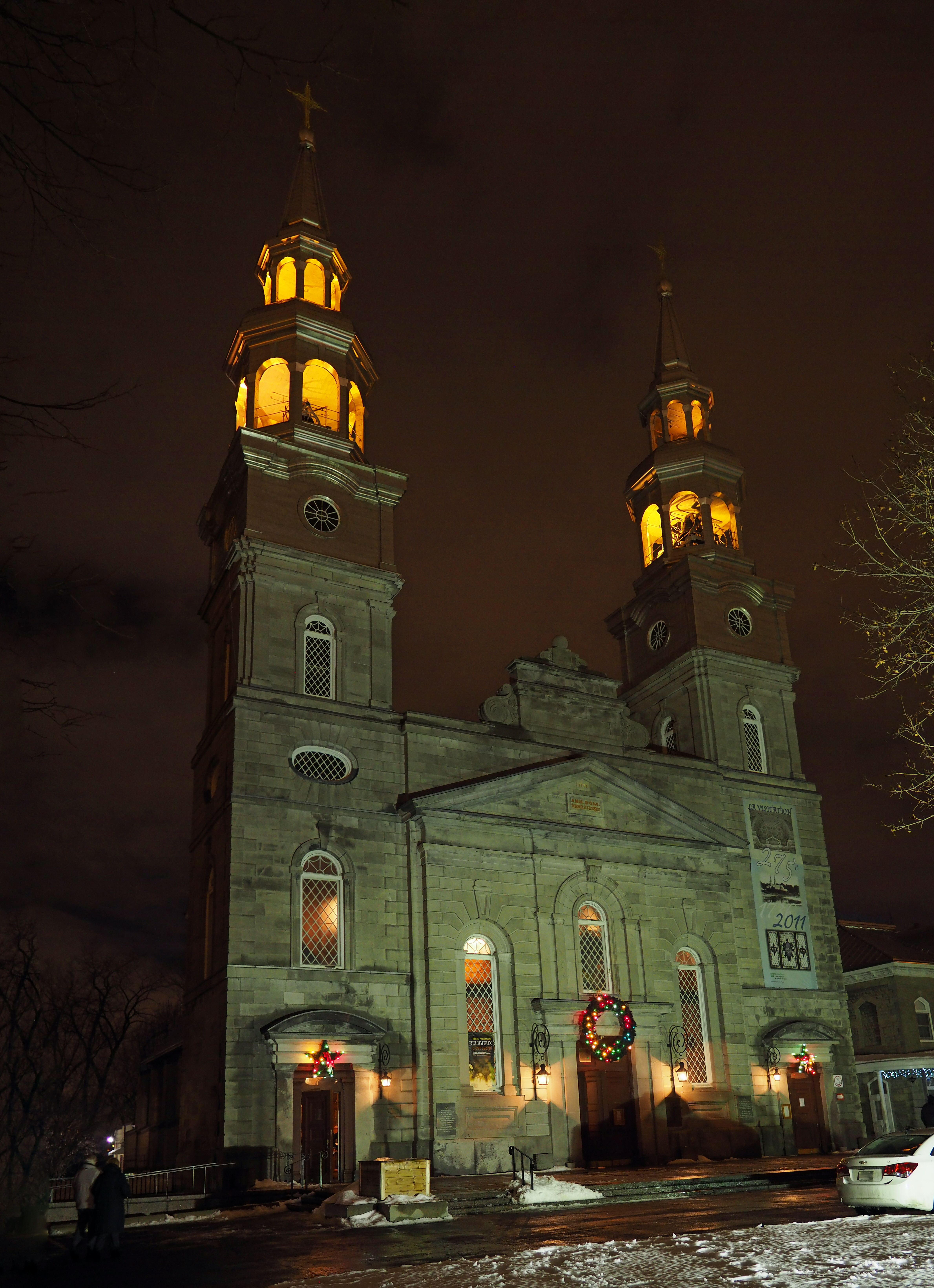 Façade de l'église de la Visitation de la Bienheureuse-Vierge-Marie, Montréal, Québec, Canada en décembre 2016.